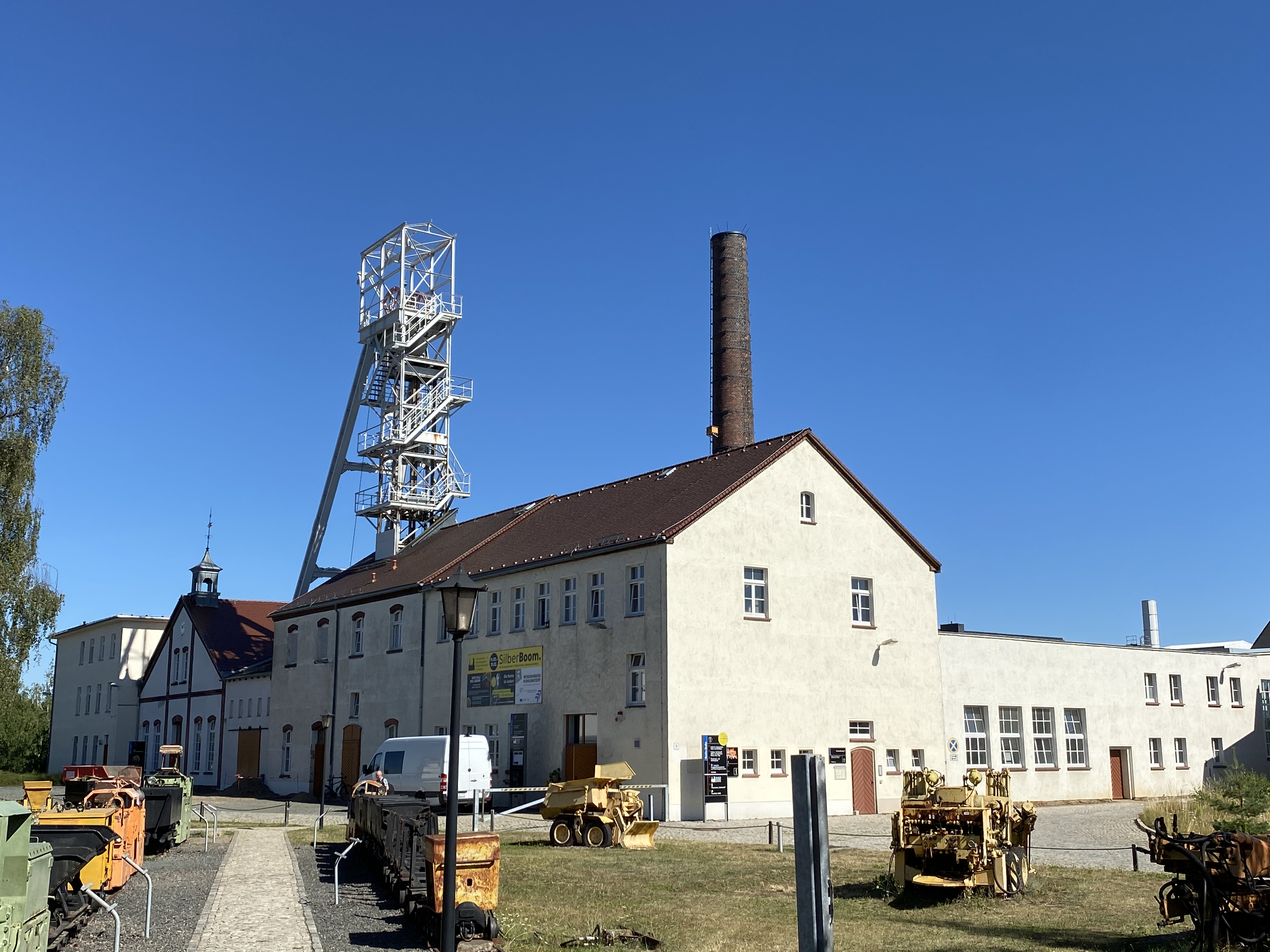 Tagesanlagen des Reiche-Zeche-Richtschachtes (2020)